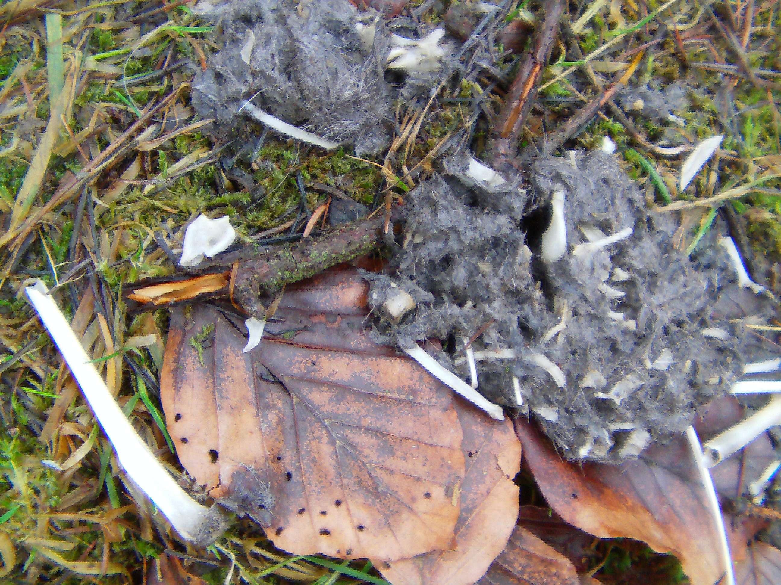 Speiballen eines Waldkauzes 1